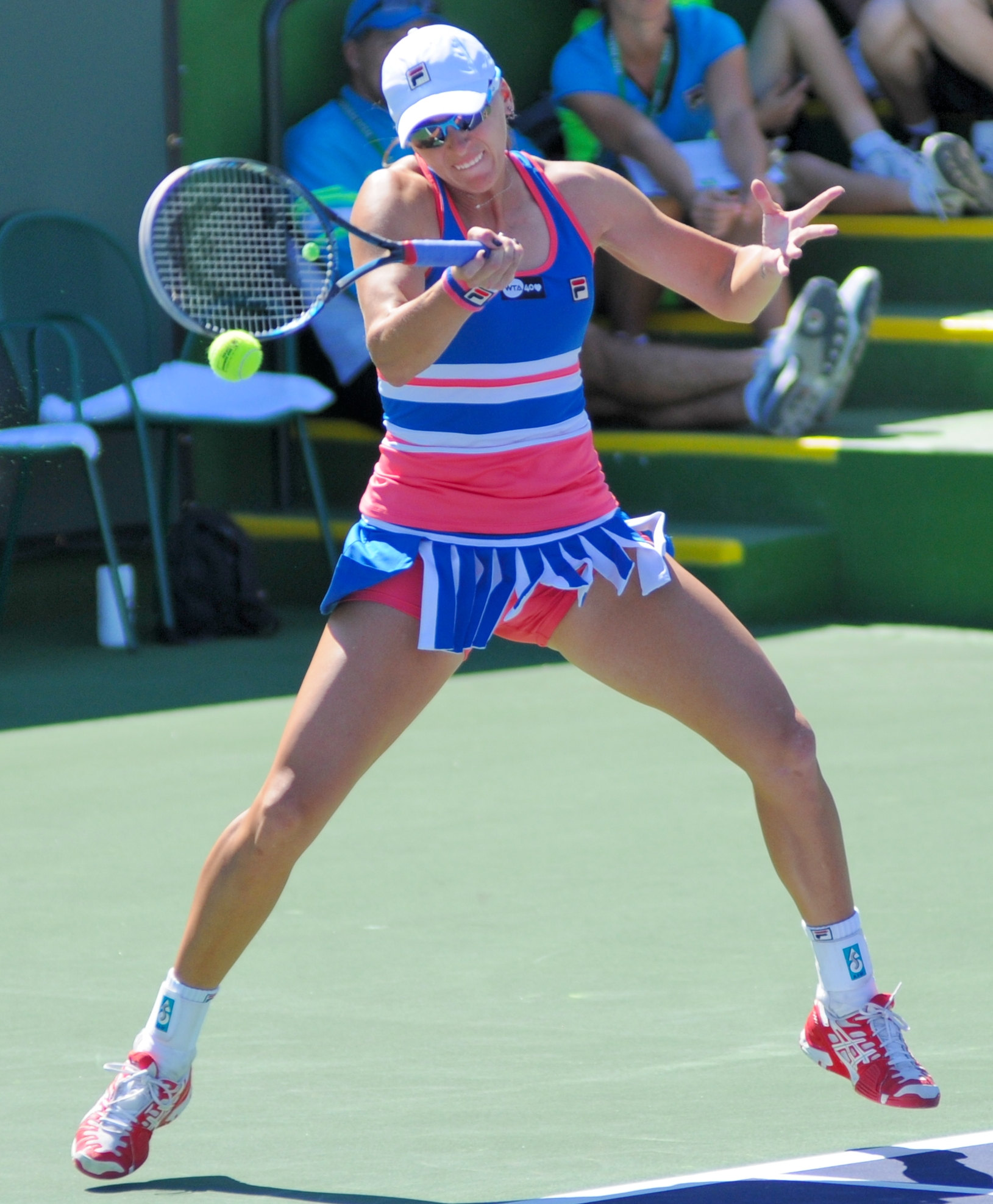 BNP Paribas Open 2013